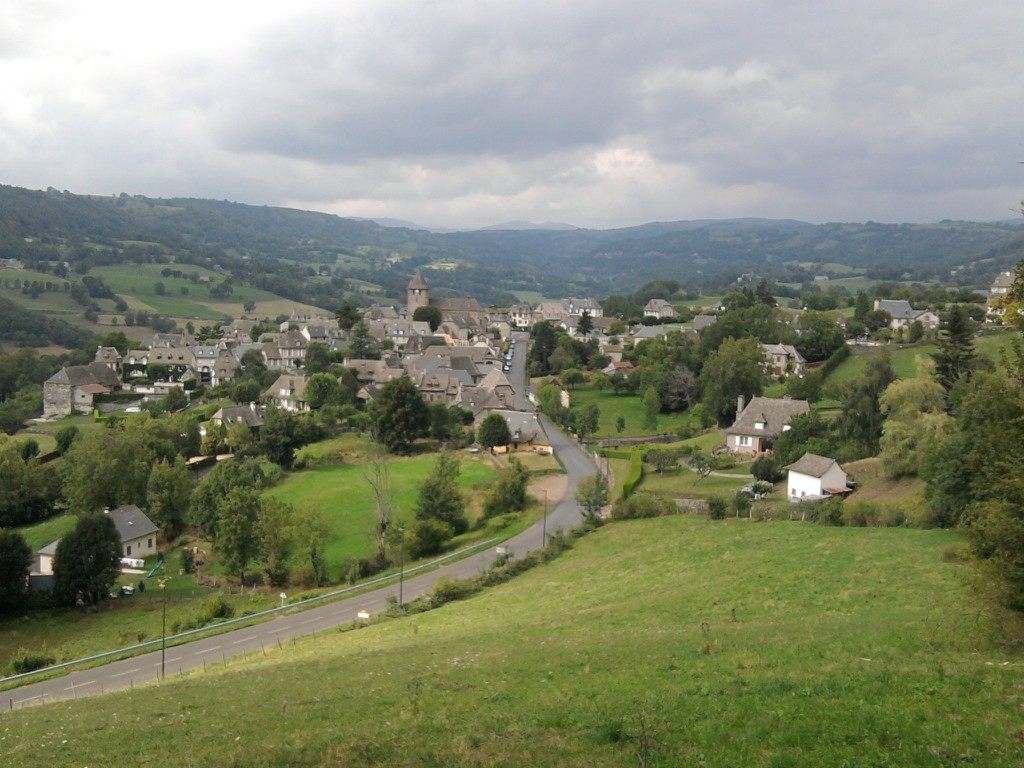 Le petit village de Raulhac, en plein coeur de la belle vallée du Goul.